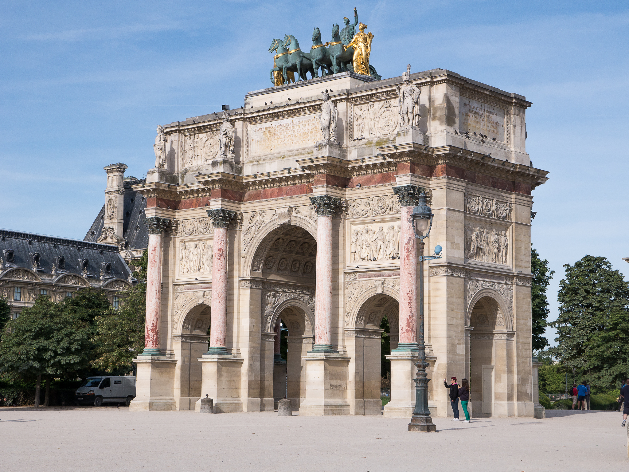 Fue construido entre 1806 y 1808 por Napoleón I, siguiendo el modelo del Arco de Constantino en Roma. Los caballos de bronce que originalmente se encaramaban en lo alto se encontraban en la Plaza de San Marcos de Venecia, y fueron parte del botín de guerra que Napoleón consiguió al abolir la república de Venecia en 1797. Estos fueron devueltos después de la Segunda Guerra Mundial. Forma parte del llamado Gran Eje de París - o Voie Triomphale -, que consiste en el Grande Arche de la Défense al oeste, el Arc de Triomphe de l'Etoile en la Place du Général Charles de Gaulle, la avenida Champs Elysées, el Obelisco de Luxor en la Place de la Concorde, los jardines de las Tullerías, el Arco de Triunfo del Carrusel y el Palacio del Louvre (Museo del Louvre).